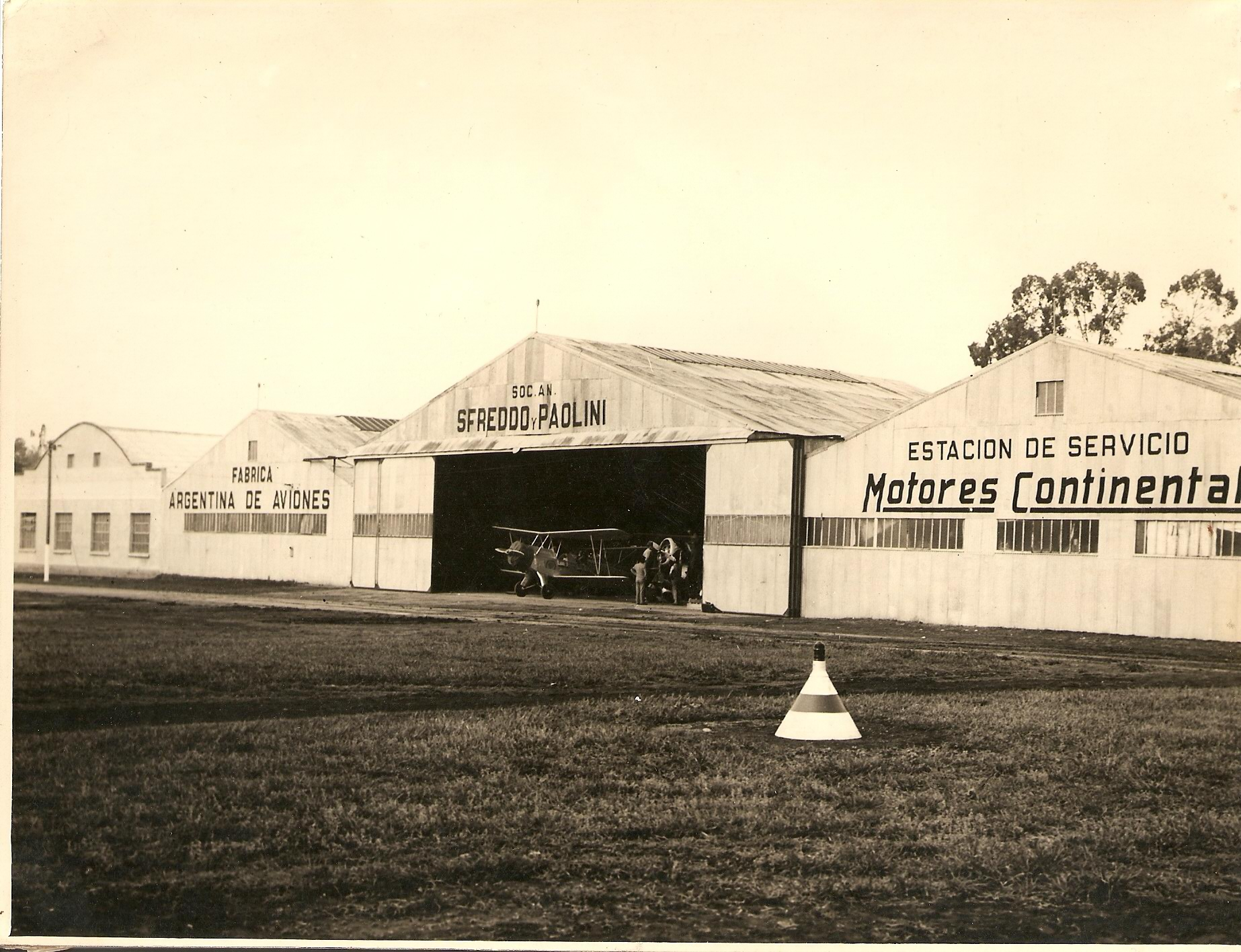 Vista exterior de las instalaciones Sfreddo y Paolini. Año 1941